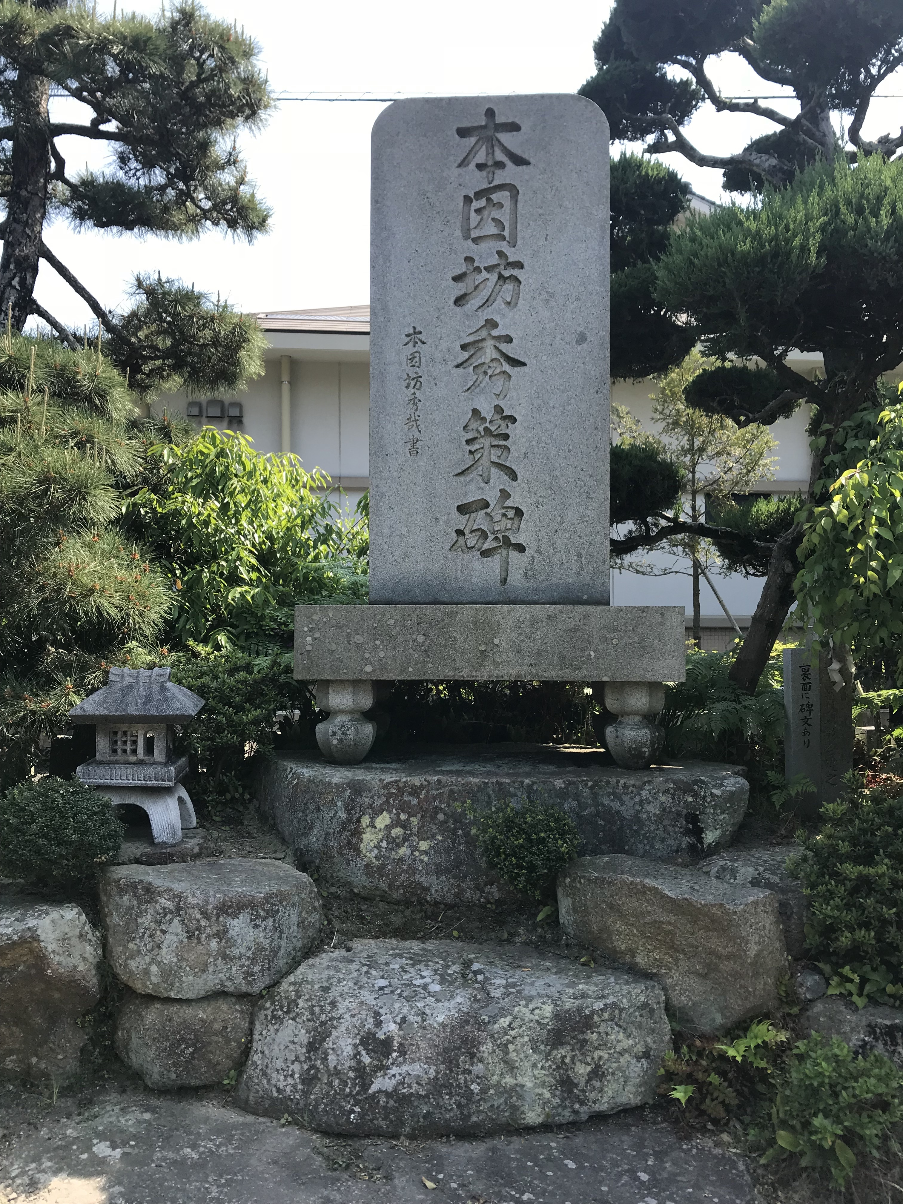 石切風切宮にある本因坊秀策碑